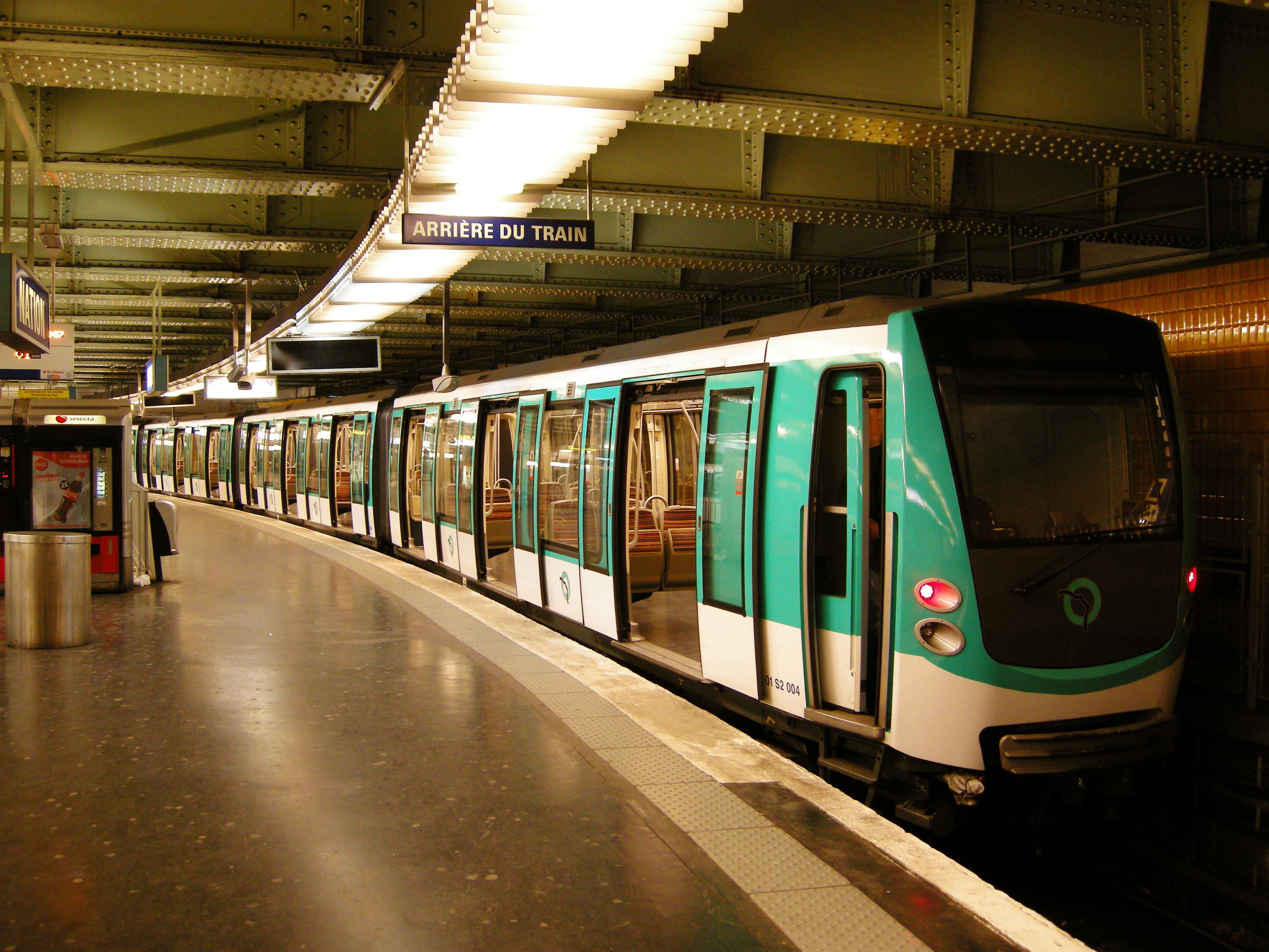 Une Rame MF01 à Nation